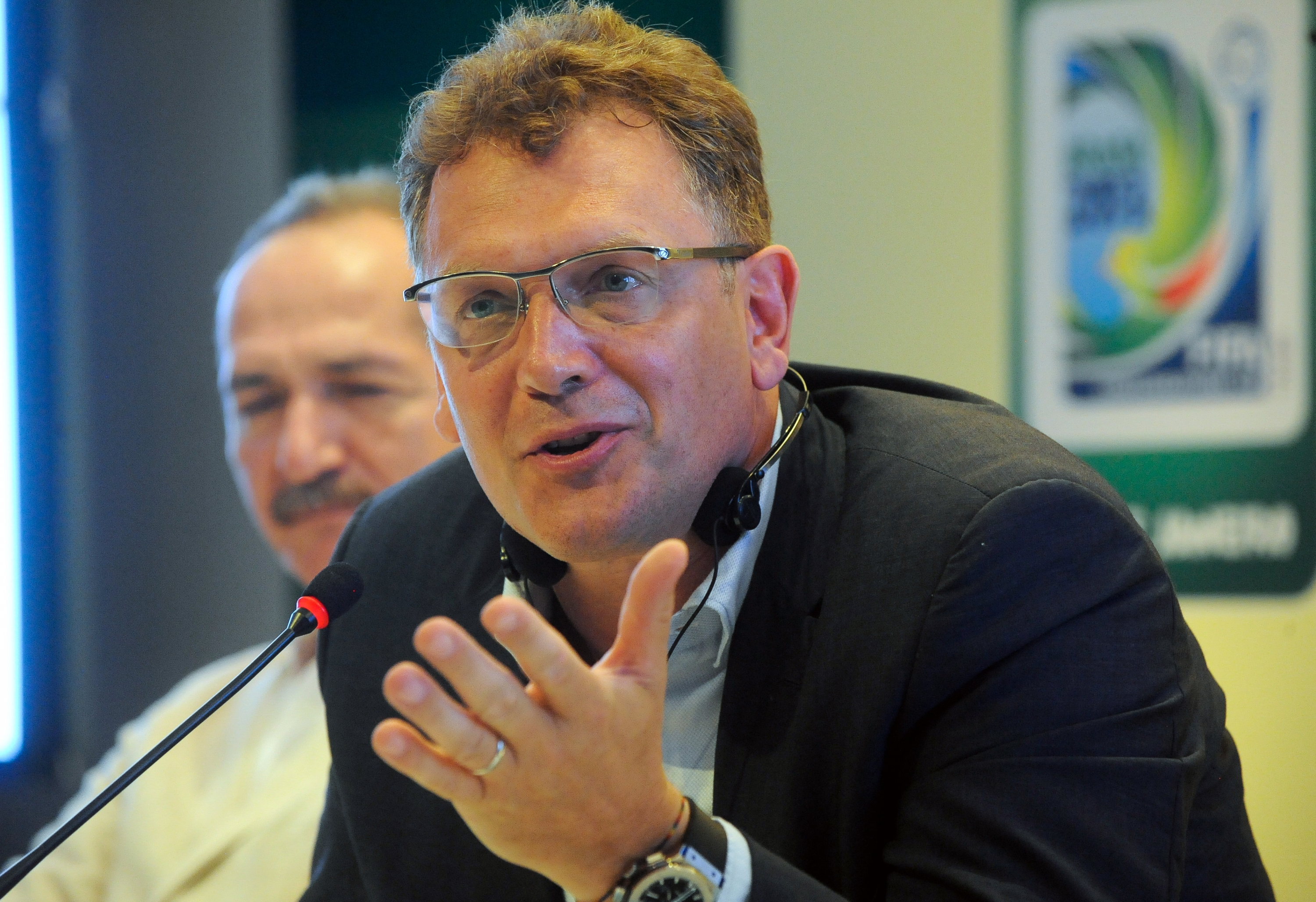 Jérôme Valcke, Generalsekräter der FIFA auf Besuch im Maracana-Stadion in Rio de Janeiro, April 2013